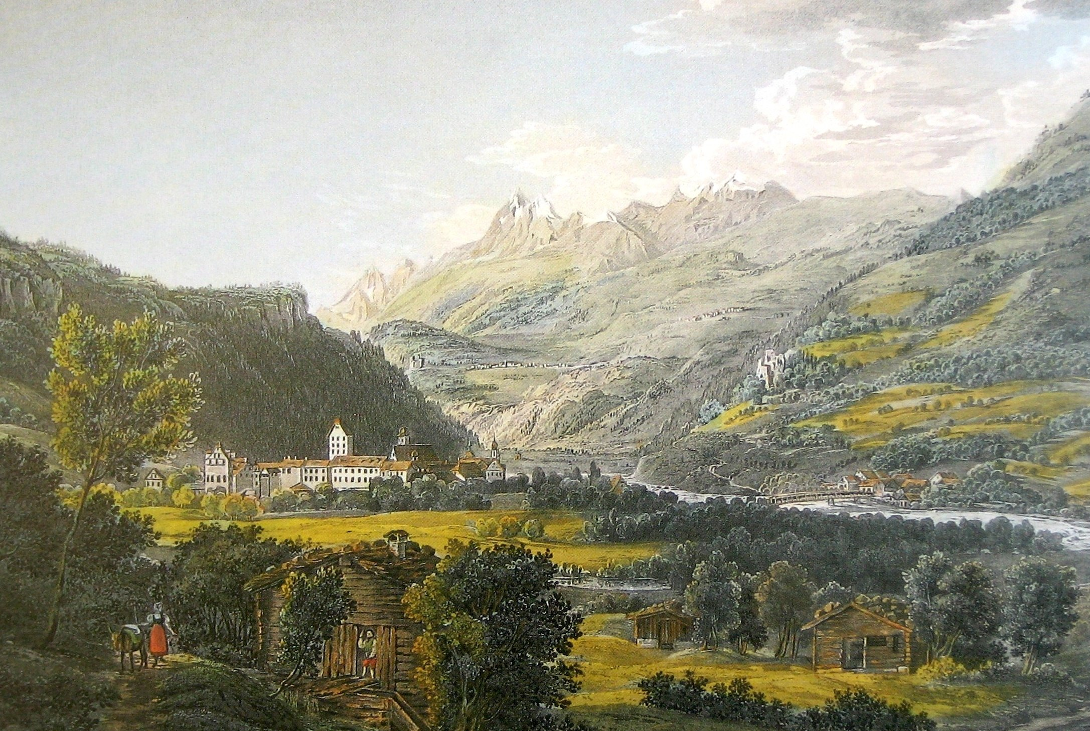 Ilanz um 1818. Kol Aquatinta von Joh. Ludwig Bleuler (1792 - 1850) und Joh. Jakob Falkeisen (1804 - 1883)